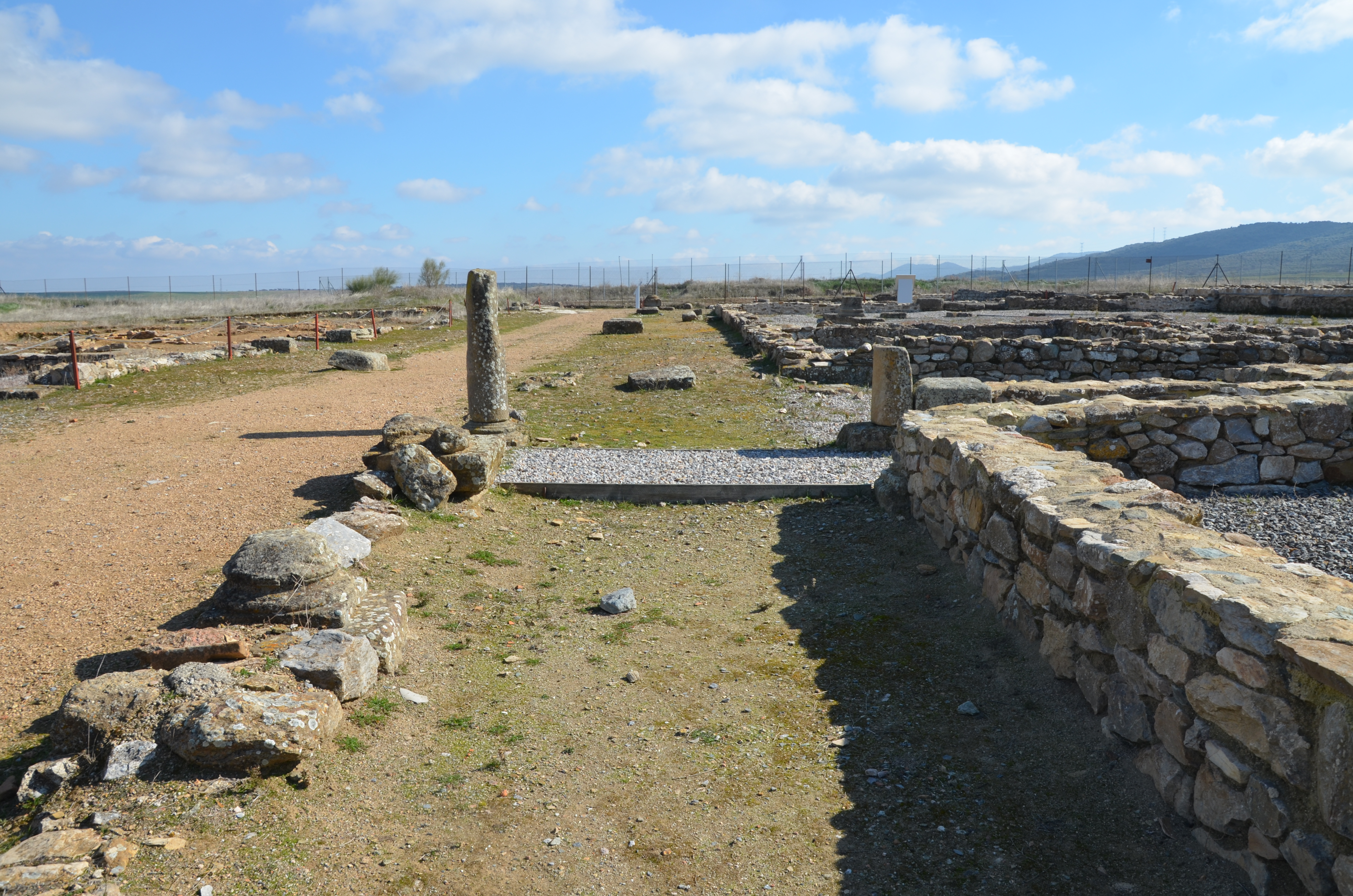 Regina Turdulorum, Extremadura, Spain